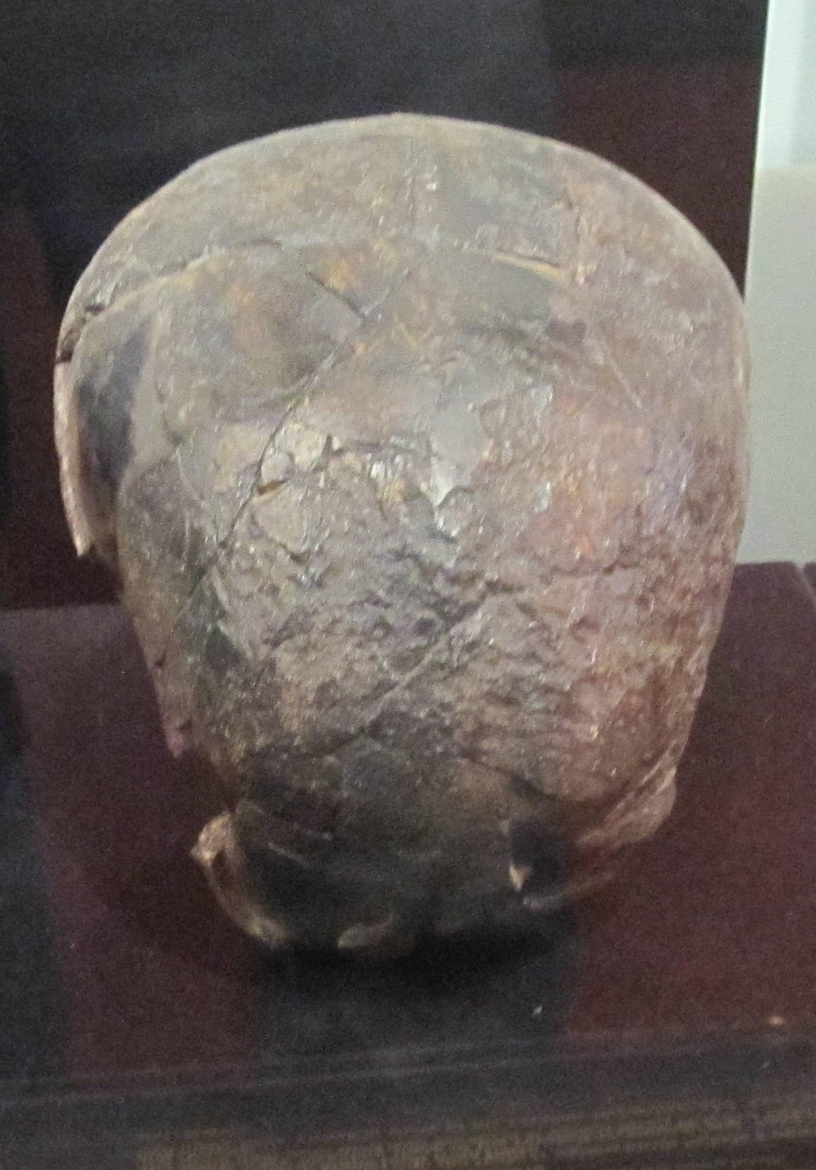 Cráneo Omo II de H. sapiens